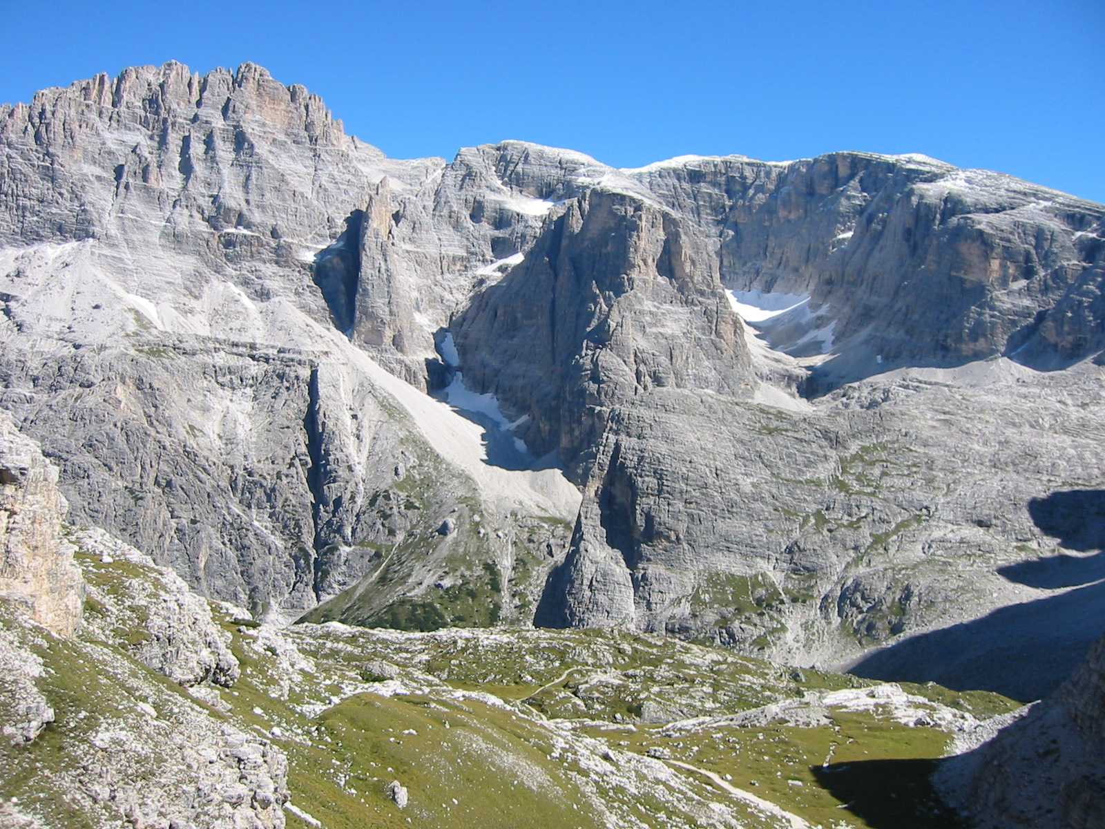 Der Elferkofl, fotografiert im September 2004 von Fantasy :-)